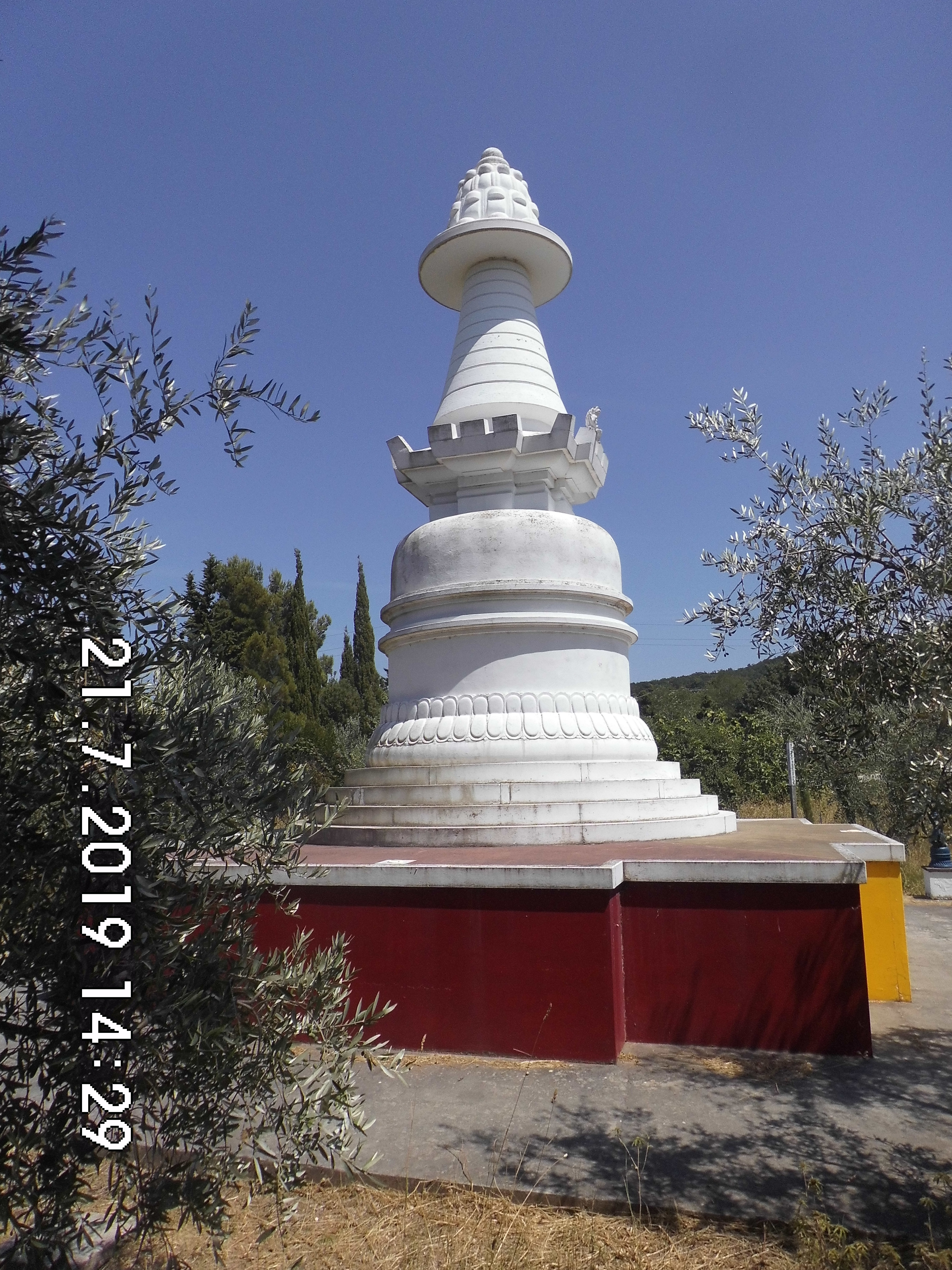 Die Stupa per la Pace (Stupa für den Frieden) von Westen in Castellina Marittima, an der Via del Commercio (pisanische SP13).